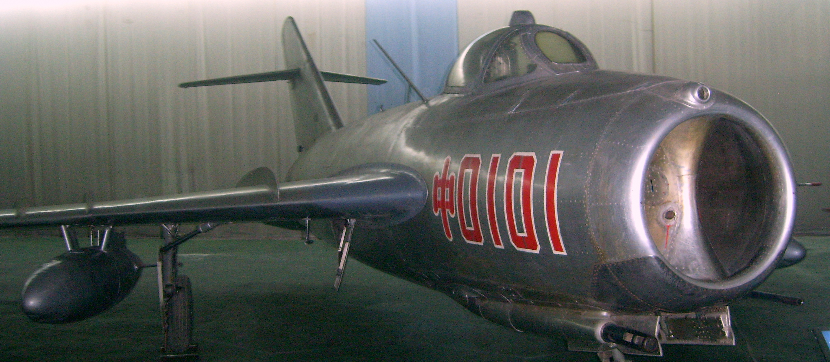 歼-5战斗机，摄于北京航空博物馆